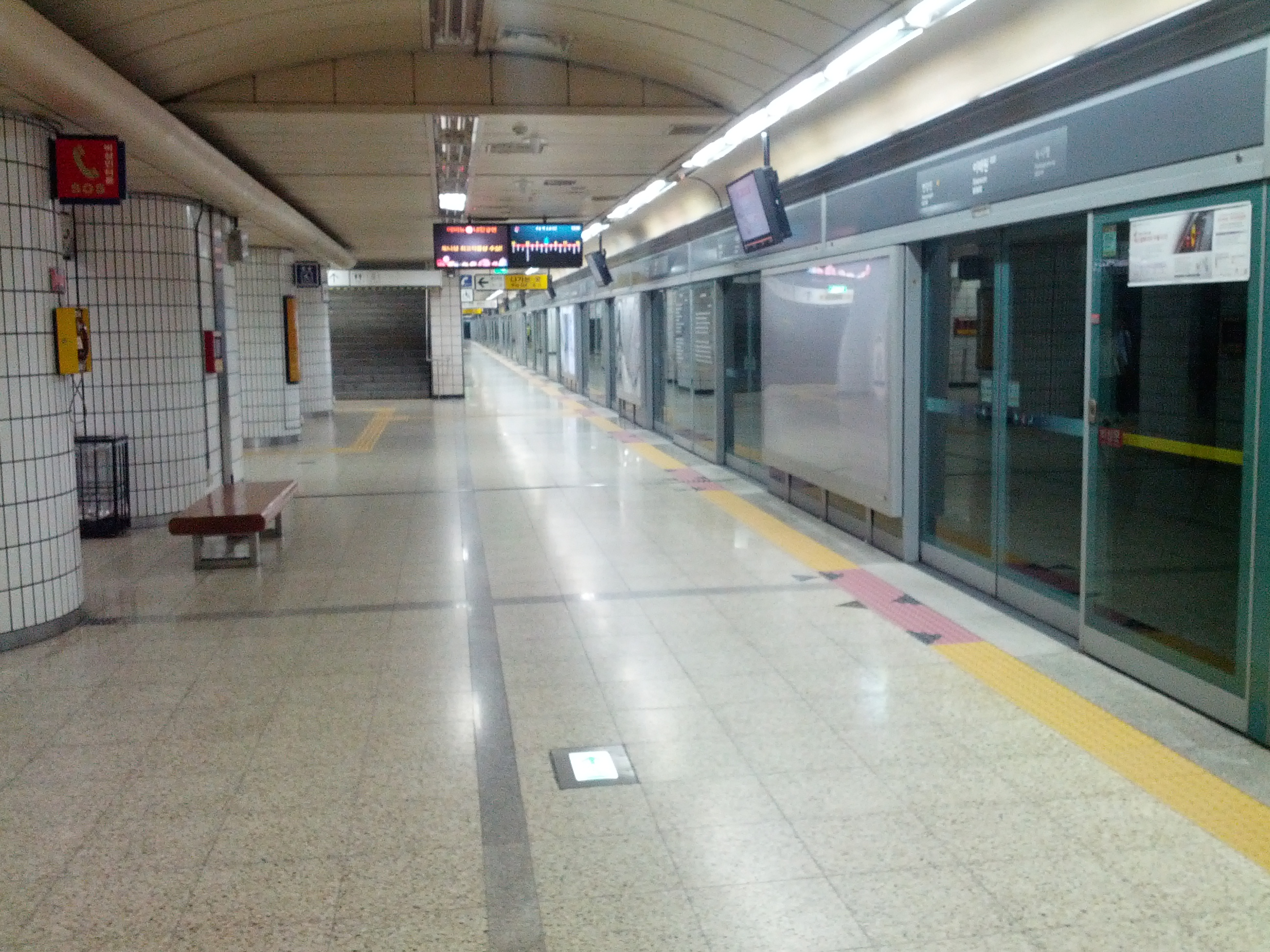 이태원역 승강장